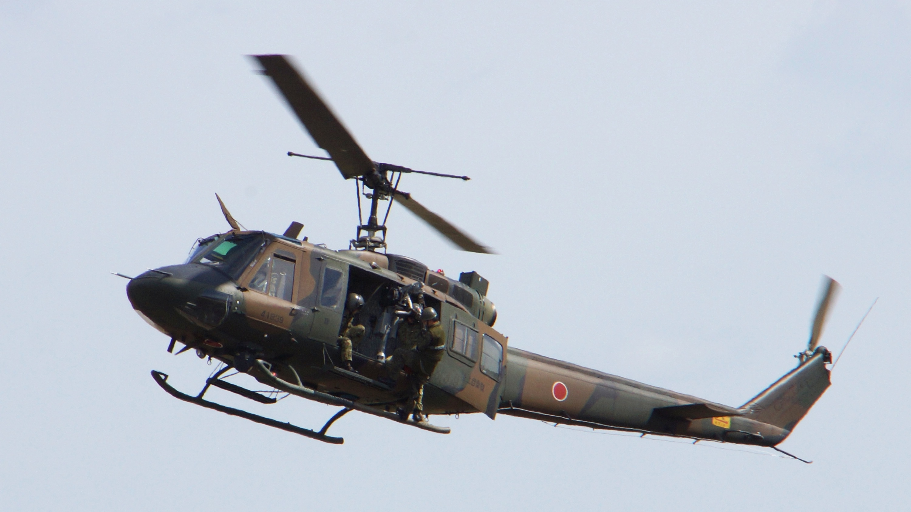 陸上自衛隊 飛行するUH-1J多用途ヘリコプター（41839号機）。2017年9月30日 海上自衛隊徳島航空基地にて。